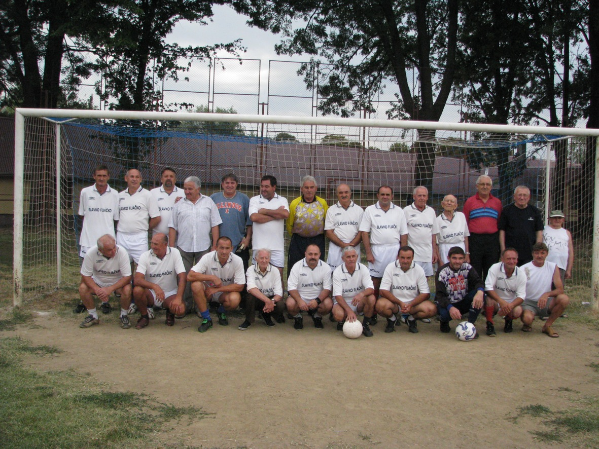 nogometni klub Športski nogometni klub "Polet" Karanac, Karanac